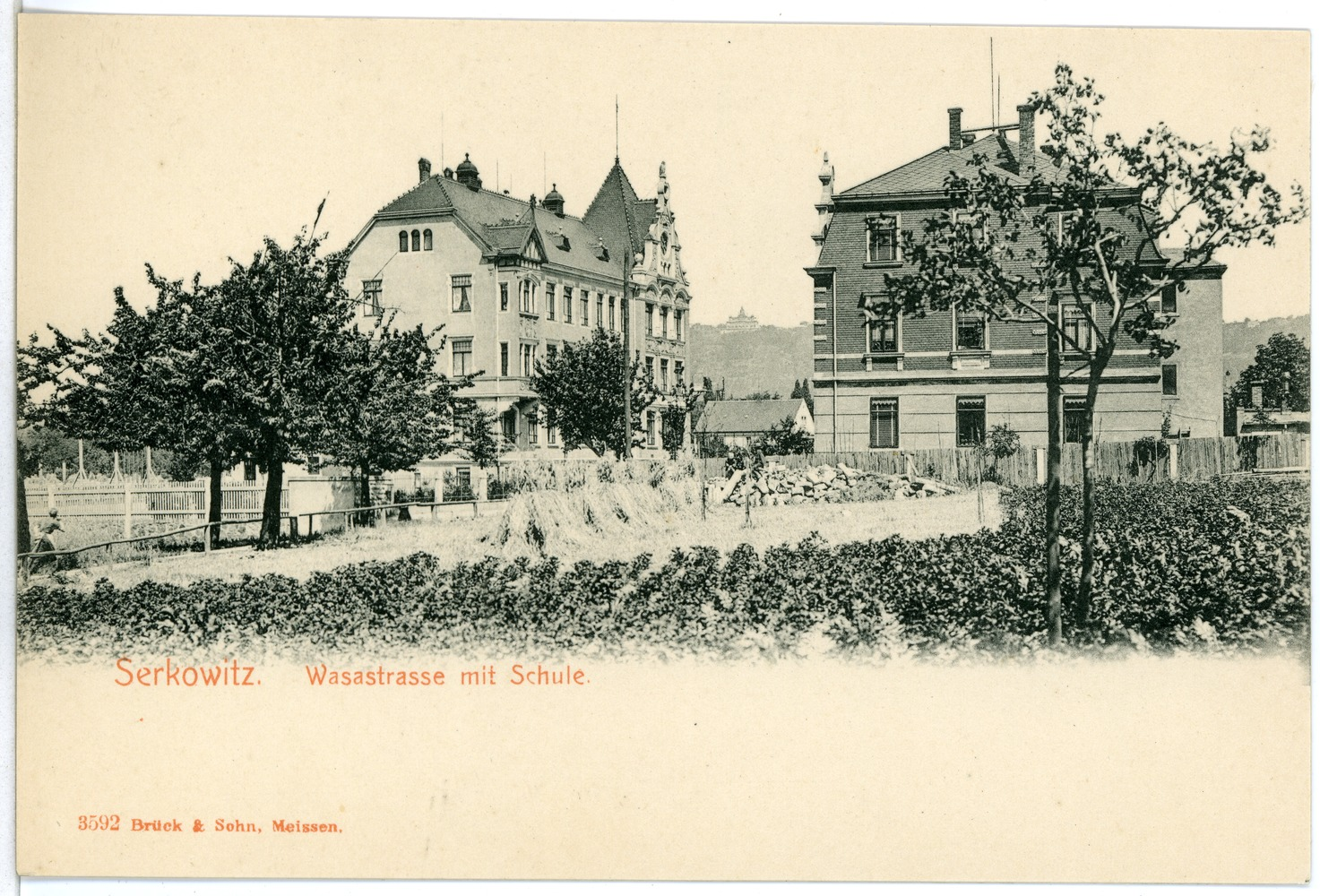 Serkowitz; Wasastraße mit Schule This postcard is from publisher Brück & Sohn in Meißen ( postcard has a unique number 03592 and is available in a higher resolution at the publisher. This images was uploaded in a cooperation project between Wikipedians and the publisher.